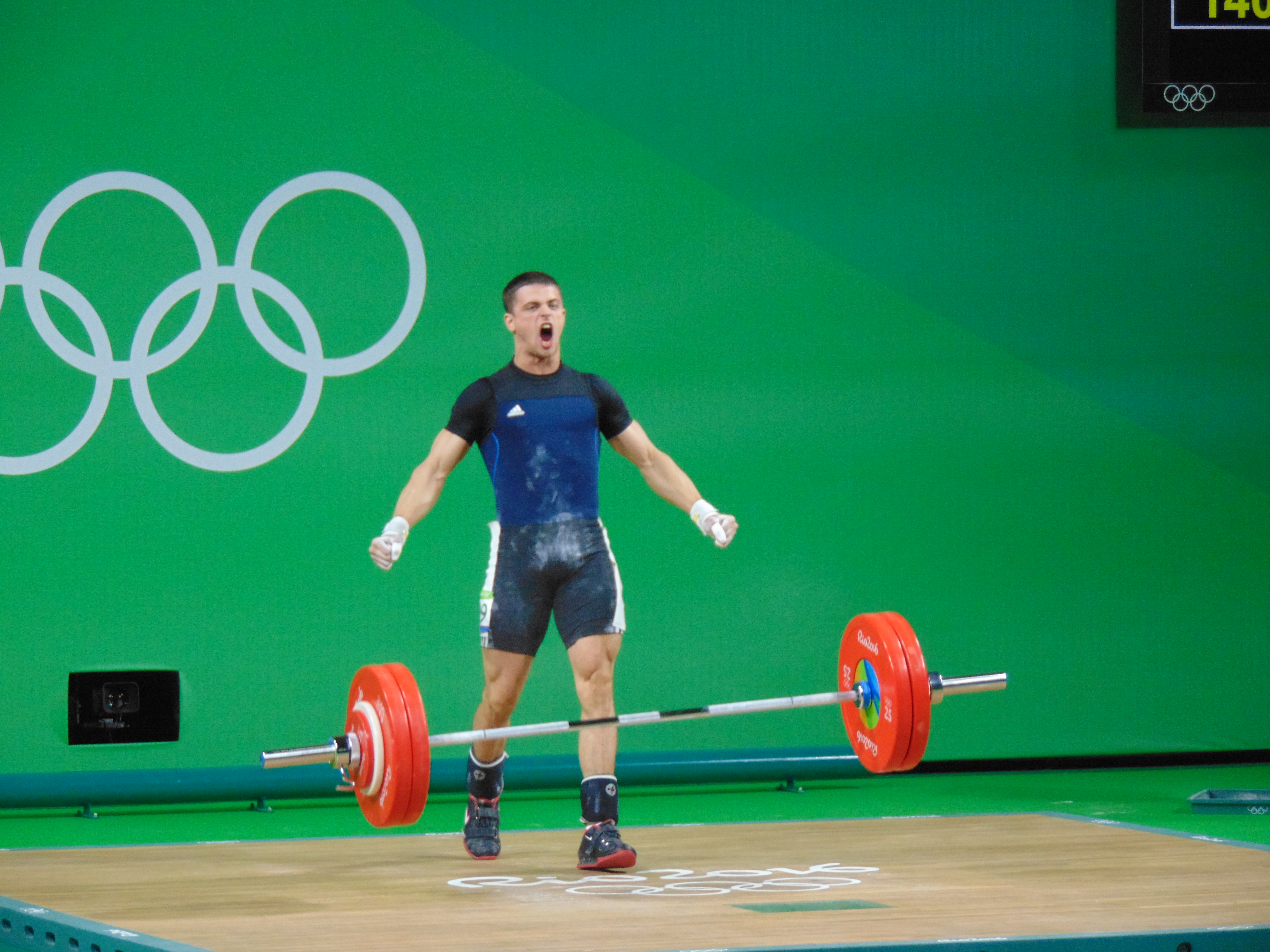 Rio 2016 - Weightlifting men's 69 kg